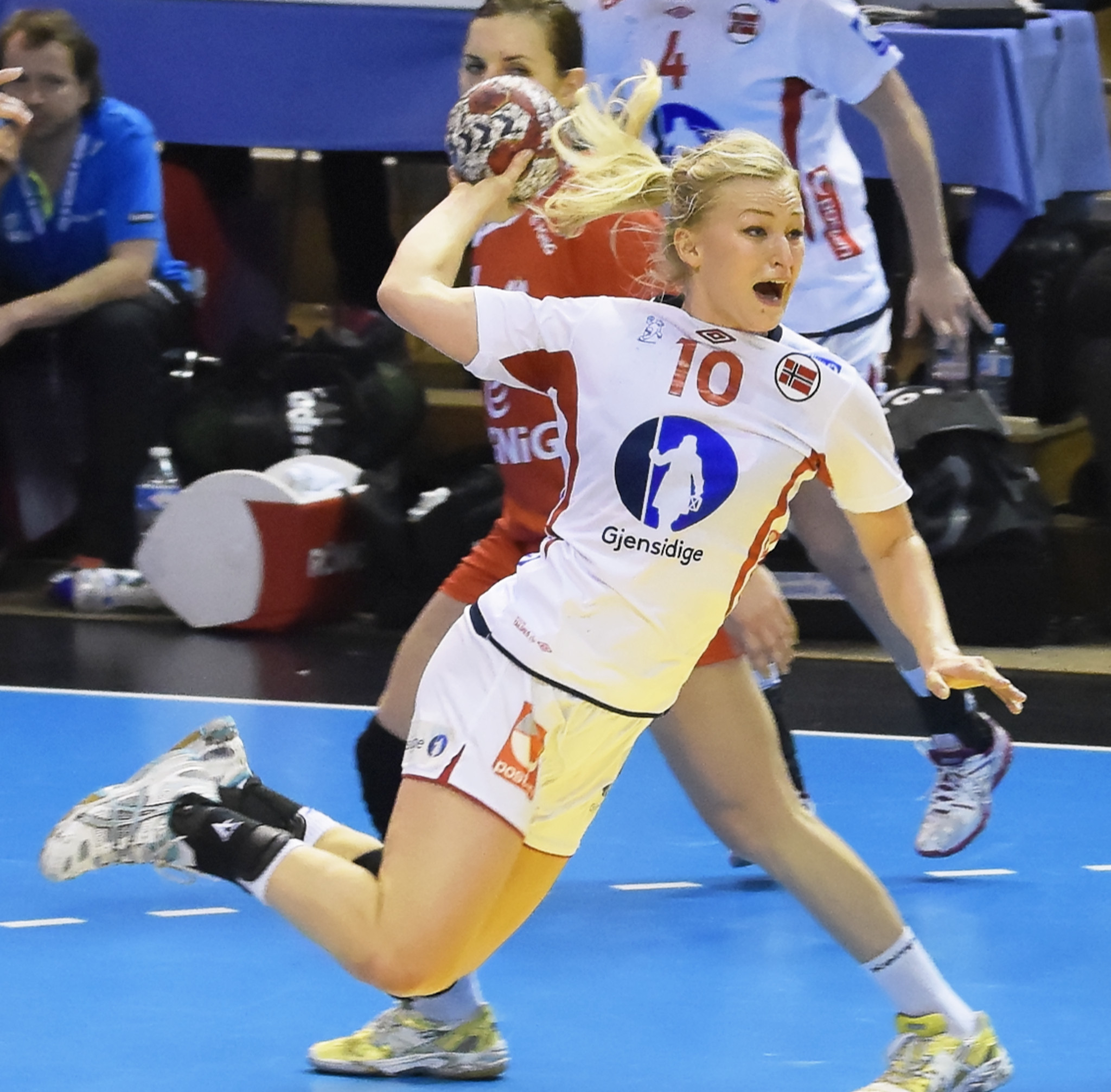 Rencontre entre la Pologne et la Norvège lors de la Golden League de handball. A Dijon, le 19 mars 2015.